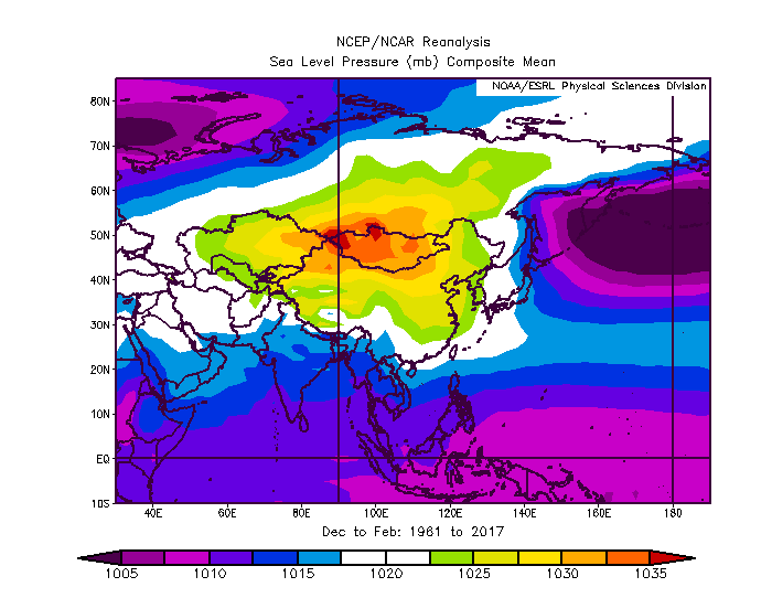 Распределение среднего атмосферного давления над уровнем моря над территорией Азии в зимние месяцы 1961-2017 гг. по данным реанализа NCEP/NCAR.